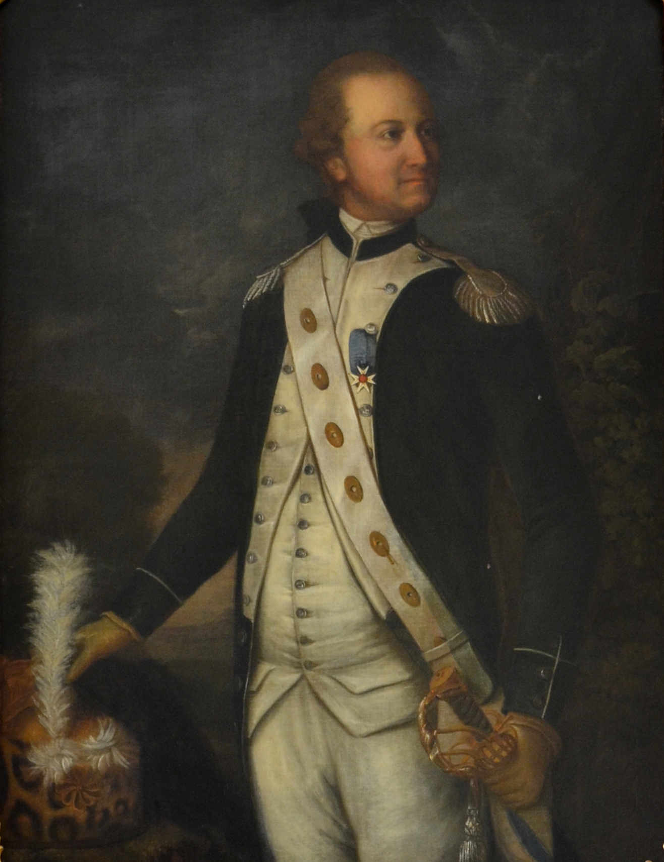 Bildnis Karl Ludwig von Erlach